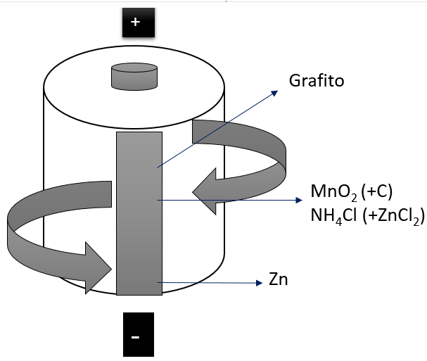 Reaccion de pila comercial